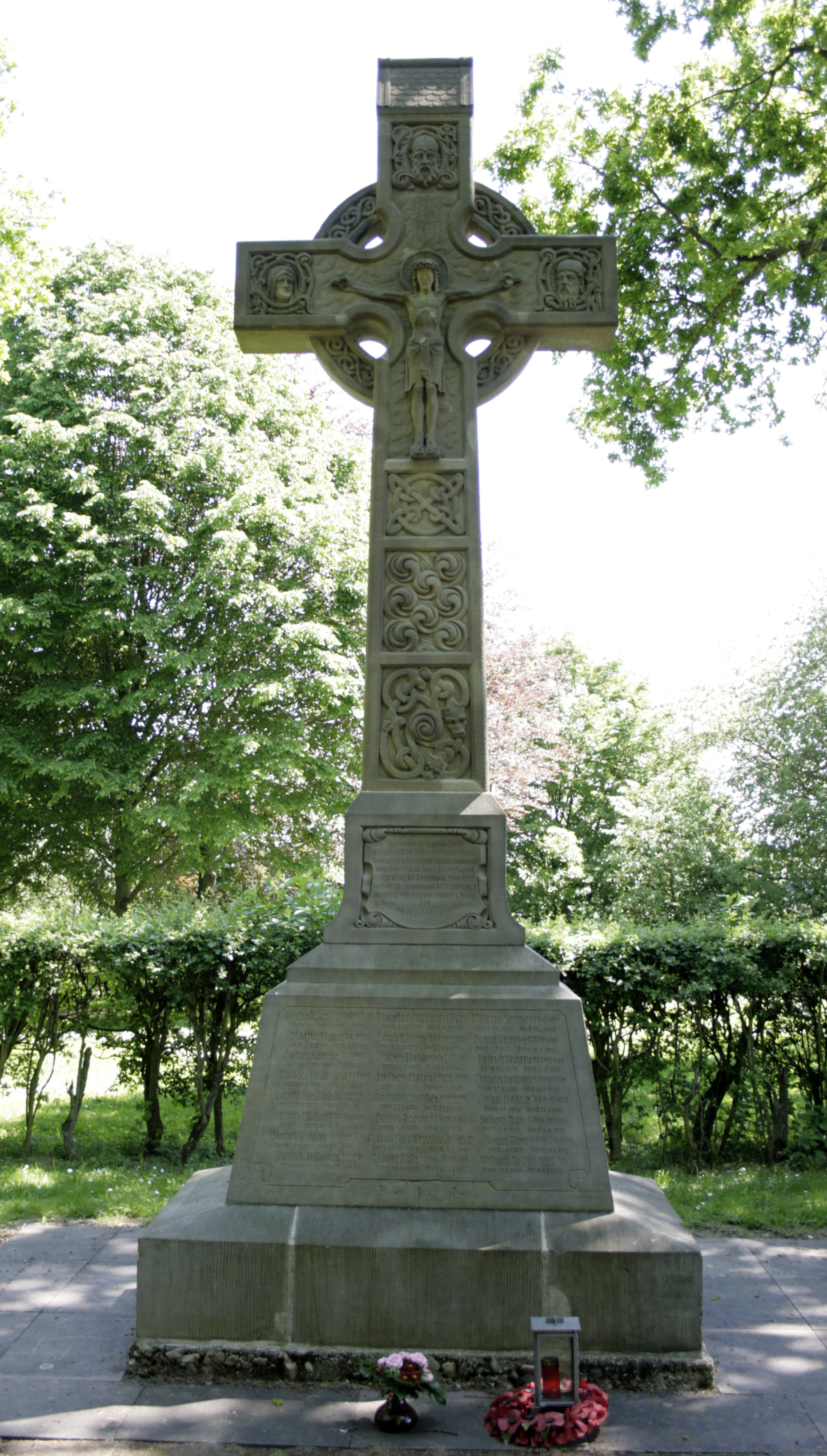 Keltisches Hochkreuz auf dem Soldatenfriedhof in Dietkirchen, Deutschland, zur Erinnerung an irische Kriegsgefangene im Ersten Weltkrieg